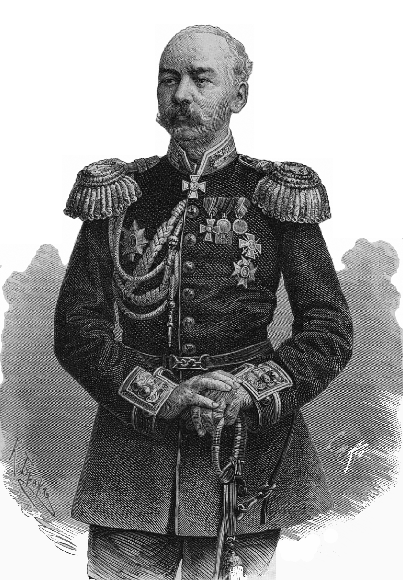 Кауфман Константин Петрович, 1873 год